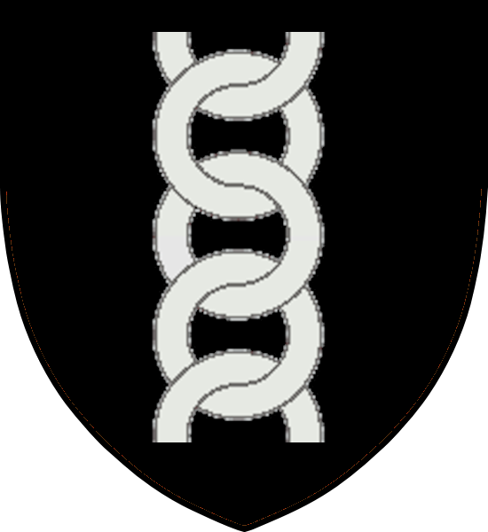 Vapensköld för tyska adelsätten Schlippenbach